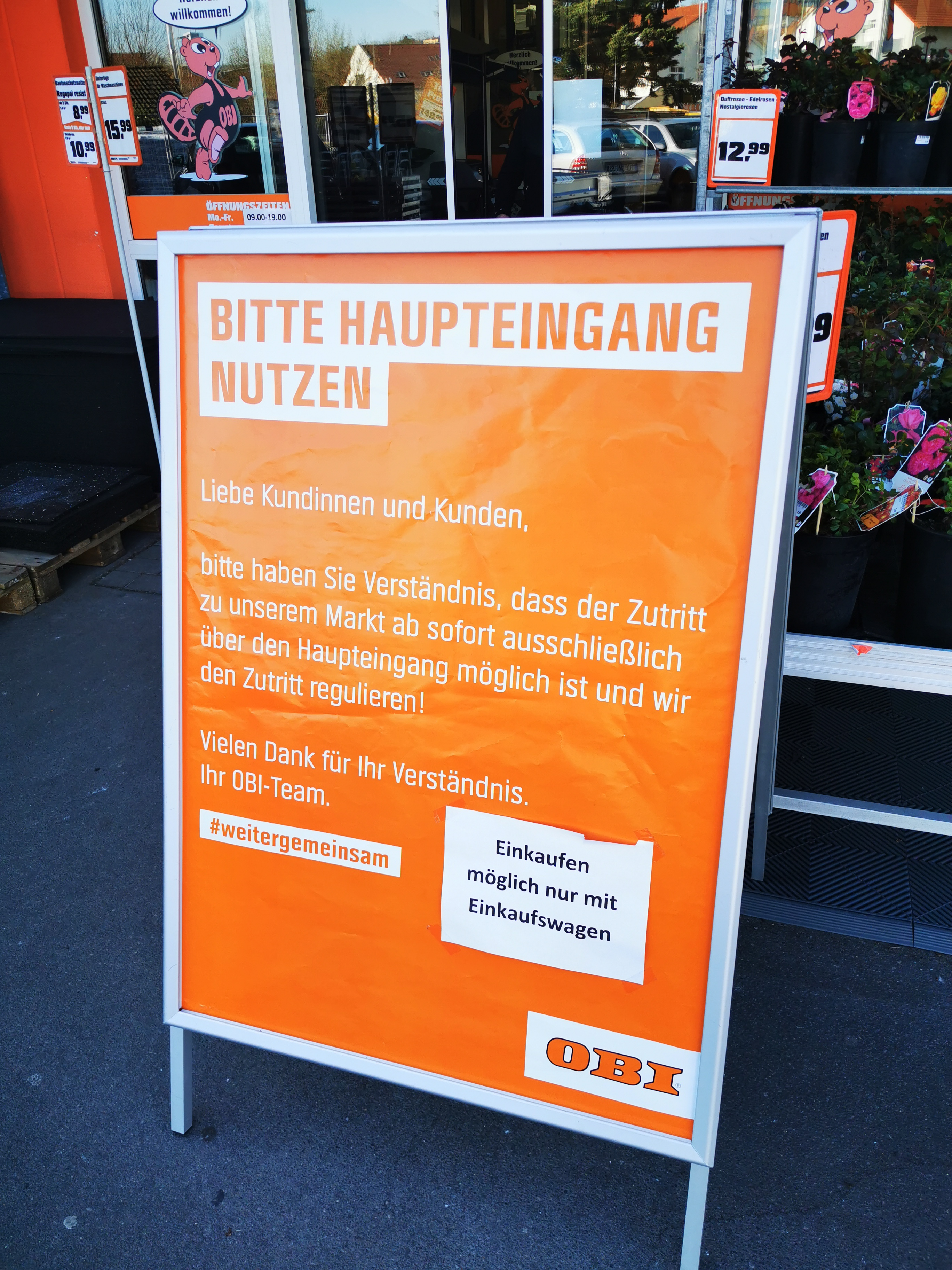 Regulierter Zutritt zu einem Baumarkt in Tauberbischofsheim aufgrund der COVID-19-Pandemie